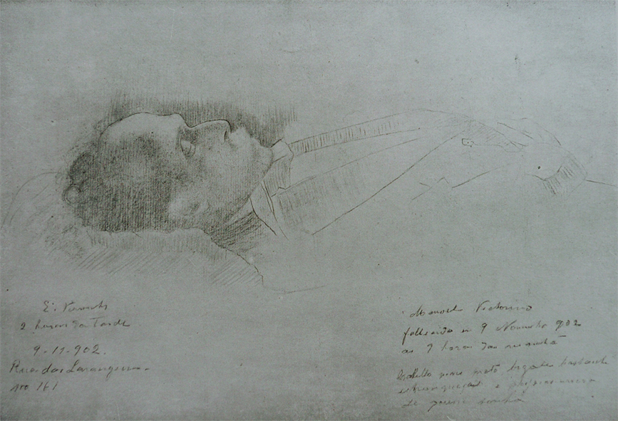 Obra do Projeto Eliseu Visconti